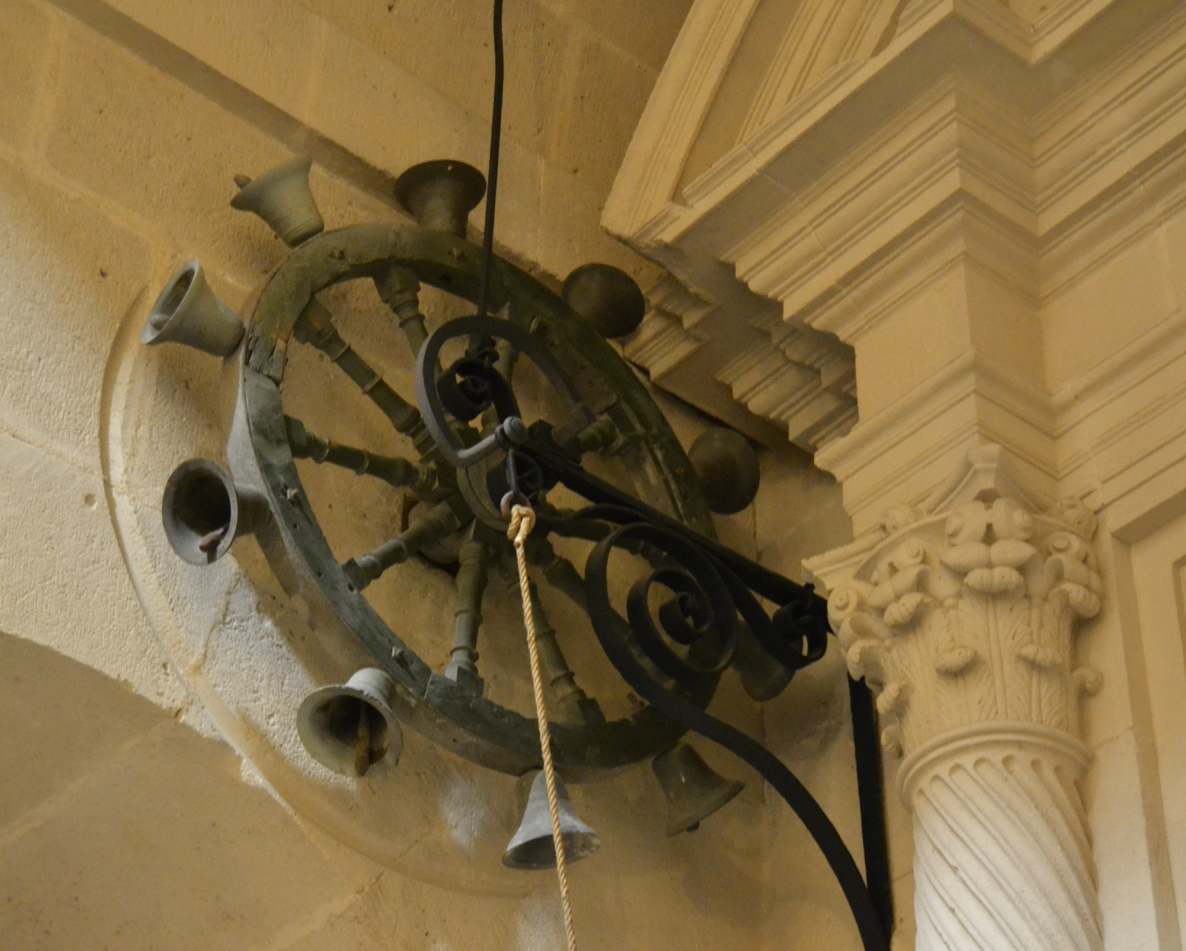 Roda de campanetes, cocatedral de sant Nicolau d'Alacant.